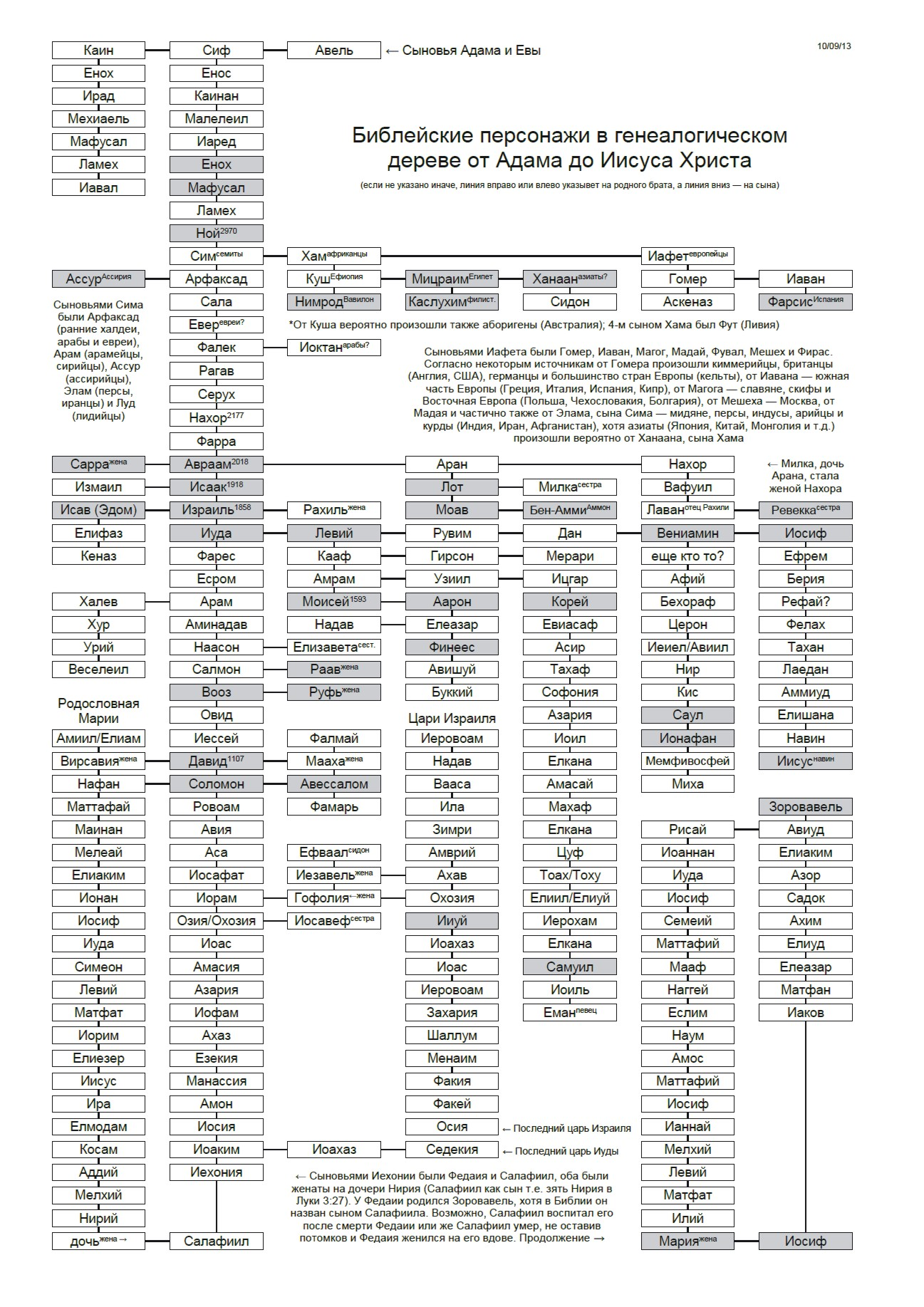 Библейская родословная от сыновей Адама и Евы до Иисуса Христа. Указано известных библейских персонажей